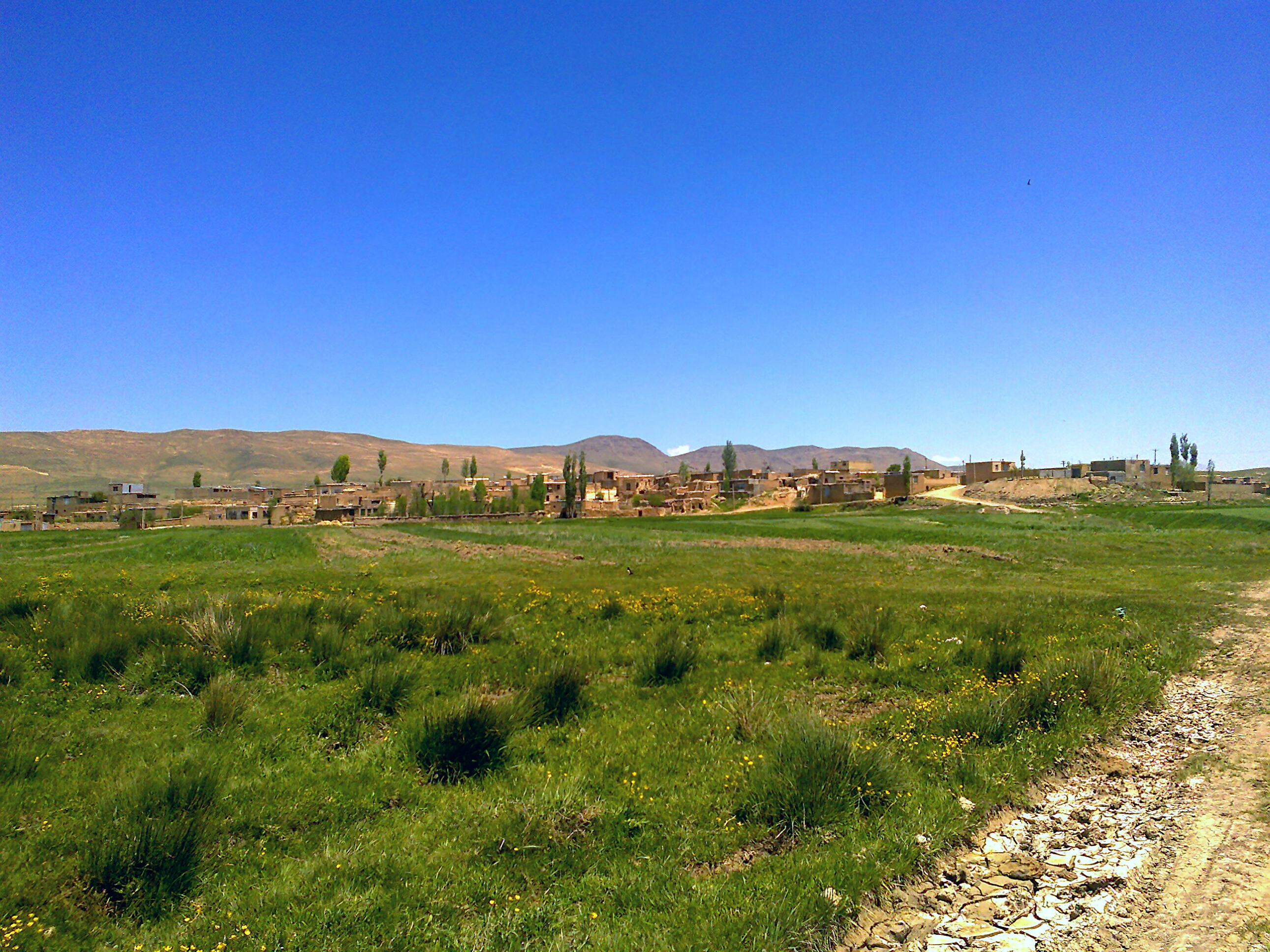 منظری ای از روستای داشکسن